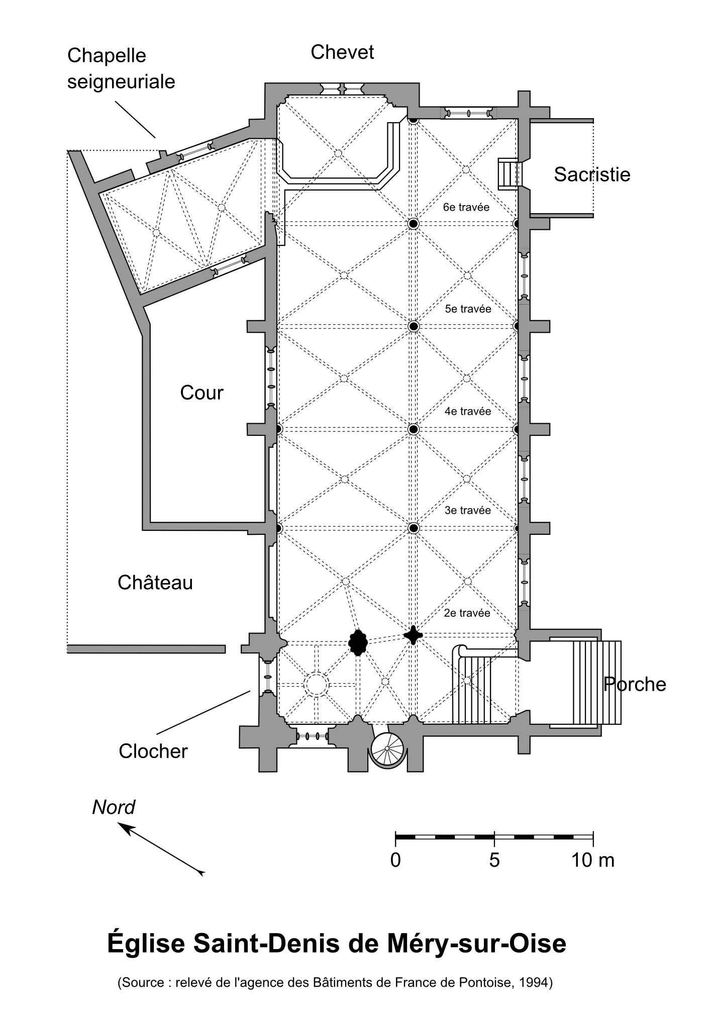 Plan des masses de l'église Saint-Denis de Méry-sur-Oise (95).